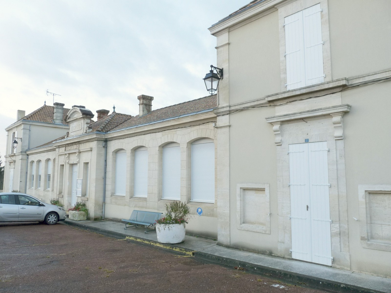 Ecole, Soubran, Charente-Maritime, France